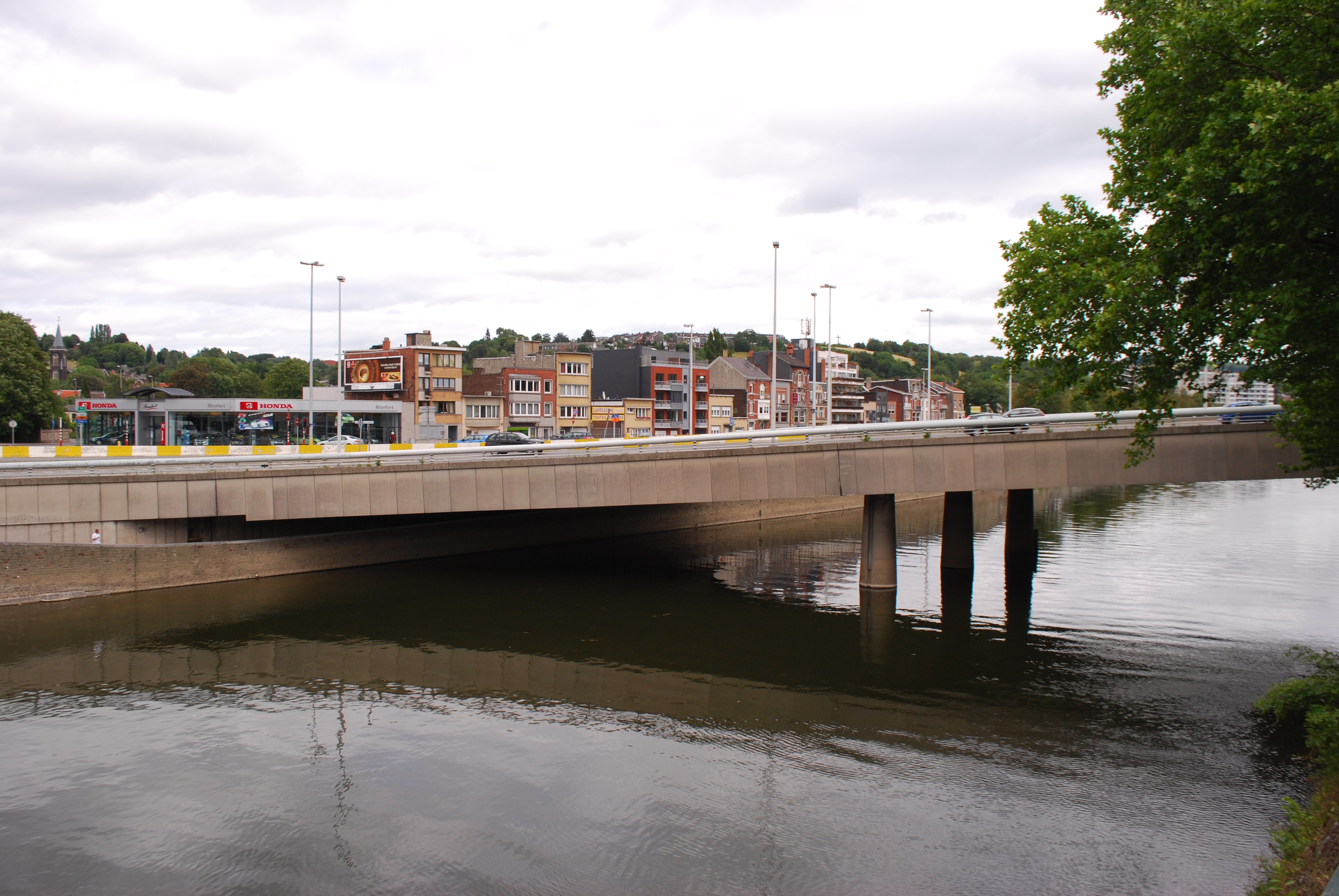 Le pont des Grosses Battes, sur l'Ourthe à Liège.